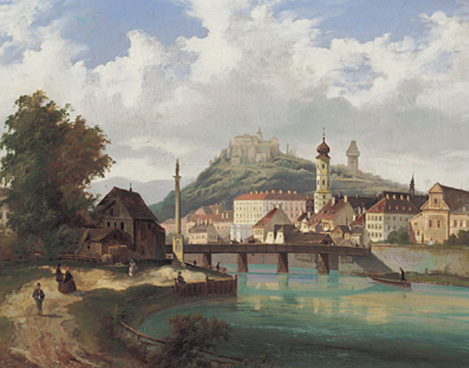 Blick auf die Grazer Altstadt vor der Schleifung der Schloßbergbefestigung 1809/10.[1] Öl auf Leinwand, 55,5 x 68,5 cm